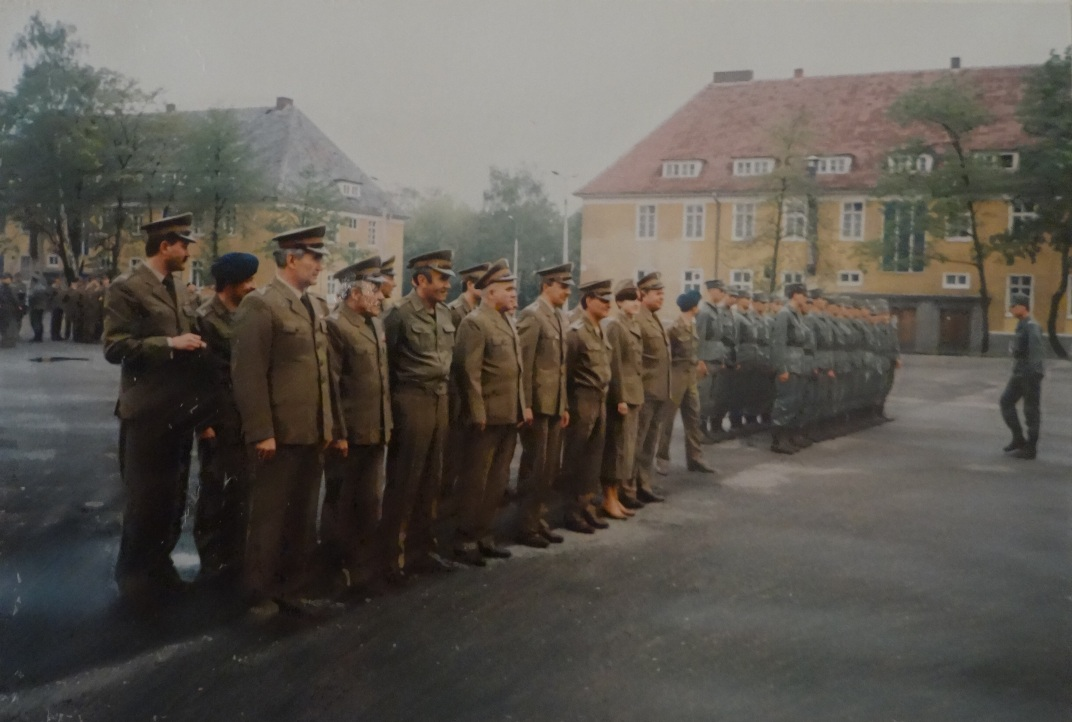 45 Batalion Medyczny na rozprowadzeniu